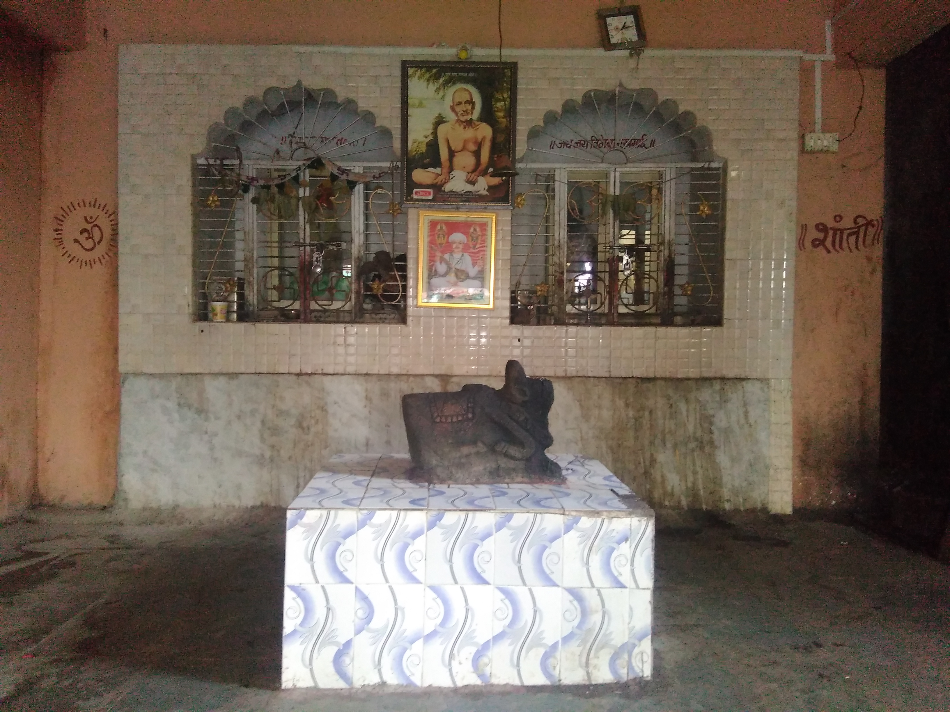 विठ्ठल मंदिर, खासगाव